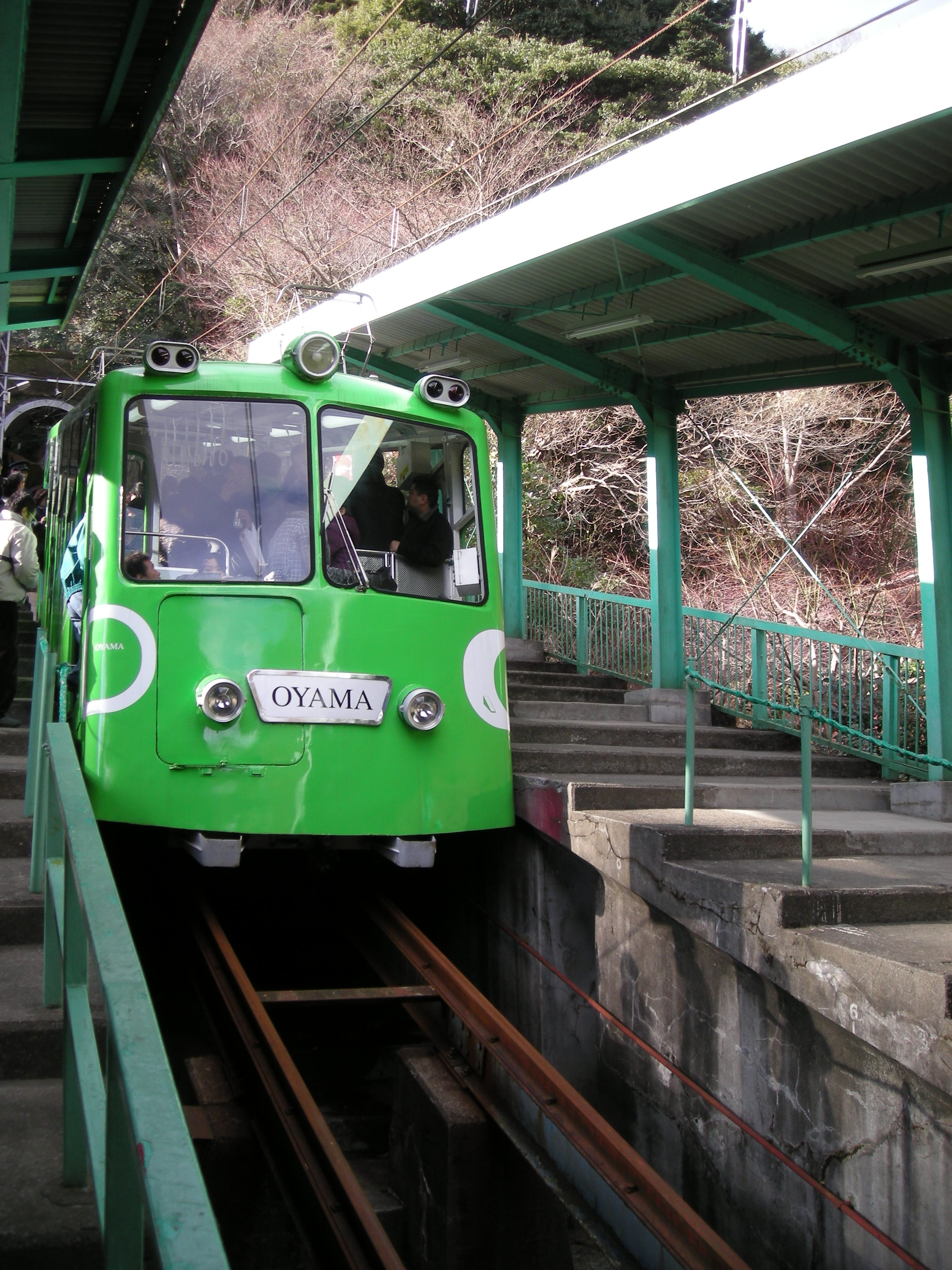 Oyama Cable Car funicular.